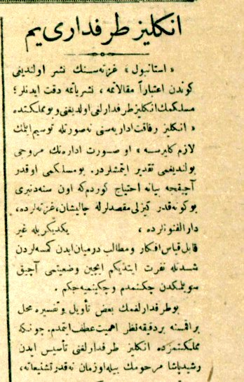 Sait Molla'nın Türkçe İstanbul gazetesinde İngiliz mandası taraftarı 13 Ağustos 1919 tarihli yazısı